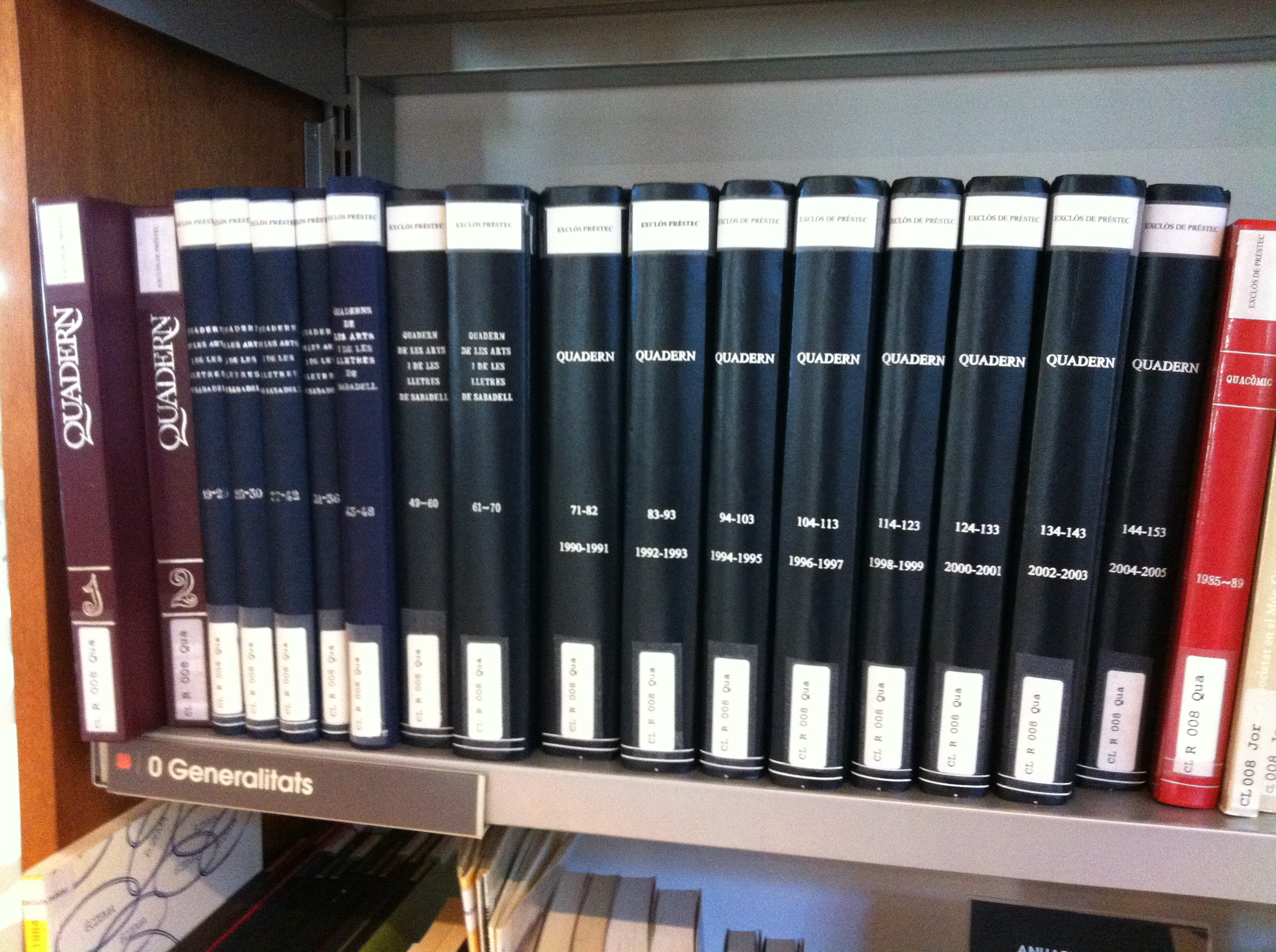 Interiors Biblioteca de sabadell Vapor Badia